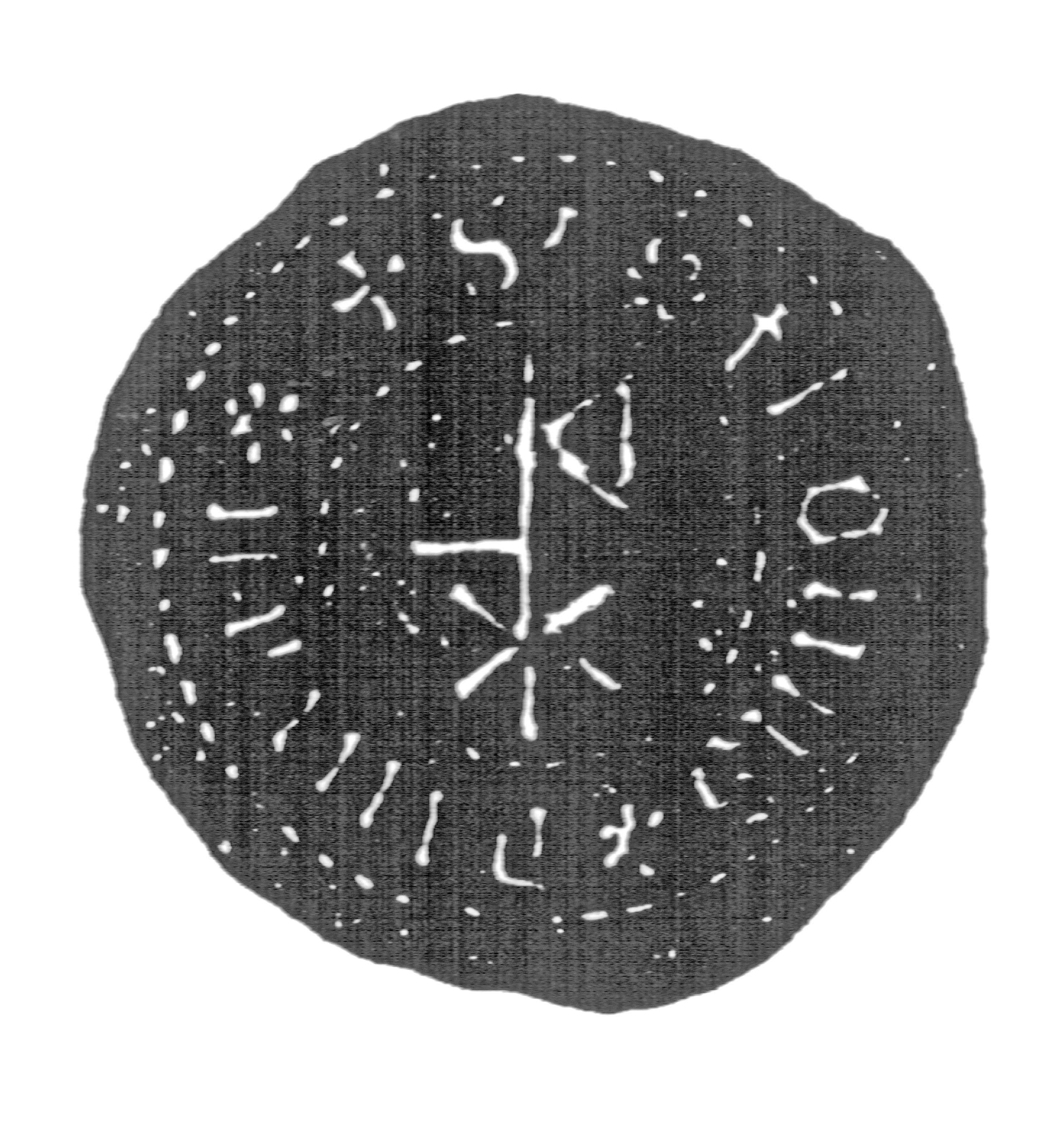 Siegel des Ratsmannes Thonies Di(y)man. Das Siegel stammt aus der Zeit um 1480. Siehe Emil Ferdinand Fehling: Lübeckische Ratslinie, Nr. 558 (Anton Dimant).